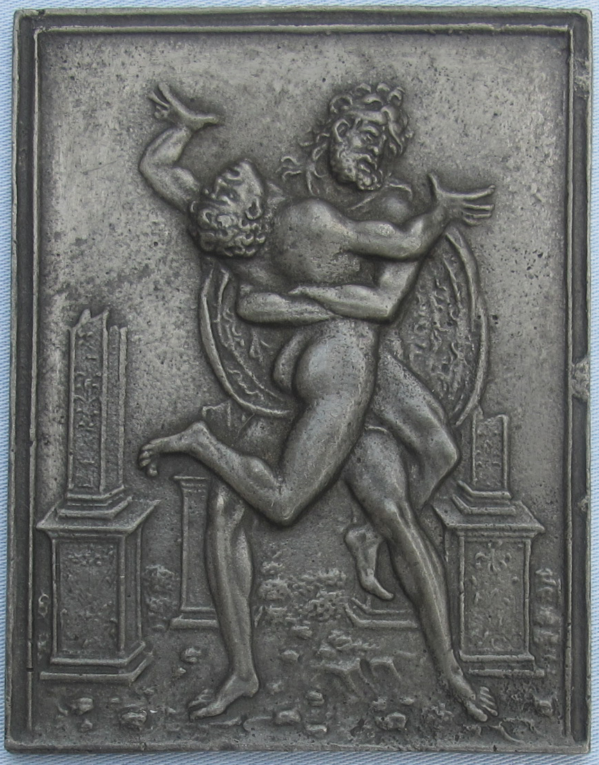 Galeazzo mondella, ercole e anteo, 1488-89